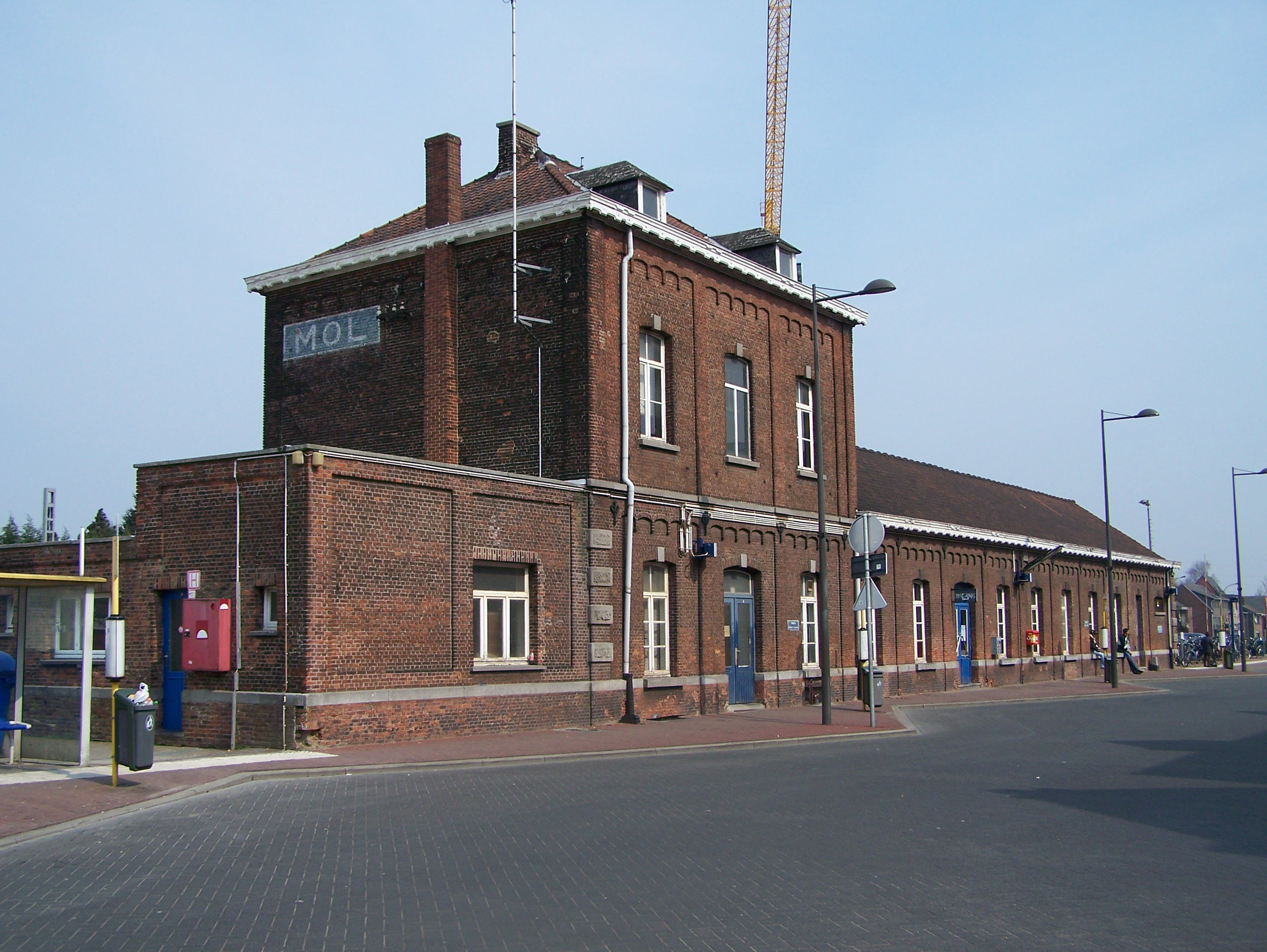 Het oude stationsgebouw van Mol